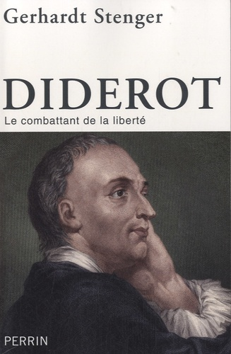 La biographie du tricentenaire de la naissance. Brillant élève chez les jésuites de Langres, le jeune Diderot monte à Paris pour y terminer ses études secondaires et s’inscrire à la Sorbonne en vue d’une carrière d’ecclésiastique. Arrivé dans la capitale, il y découvre la liberté et la philosophie des Lumières : tout en fréquentant la faculté de théologie, il abandonne la religion, devient athée et se lance...